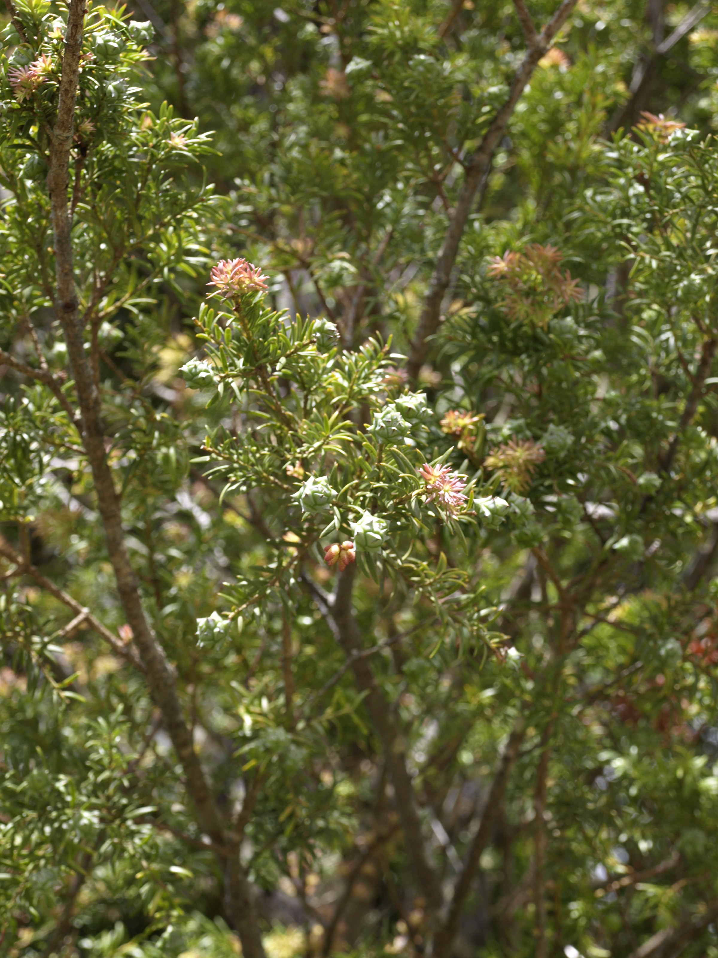 Saxegothaea conspicua, Parque Oncol, Chile.